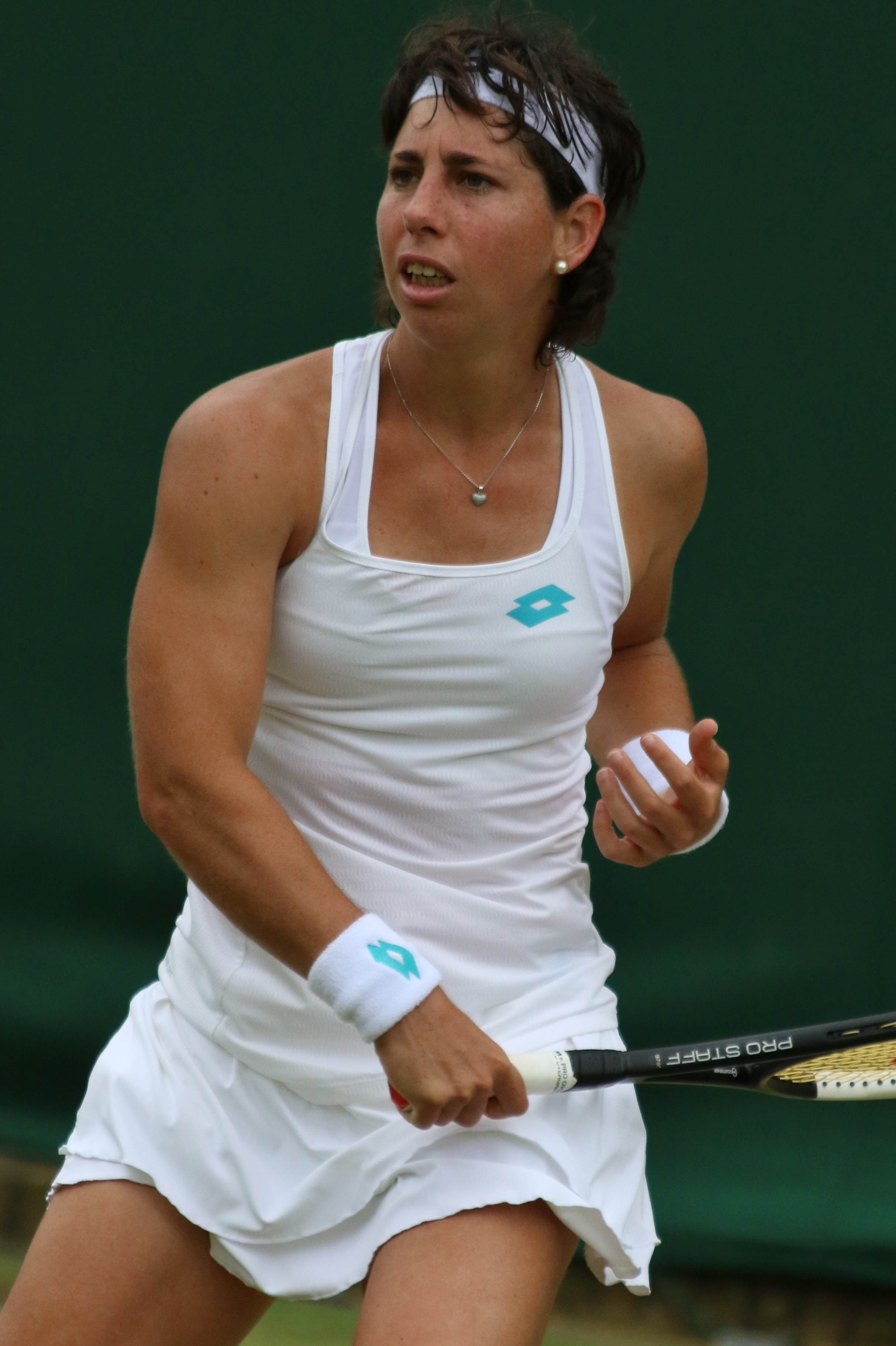 Suarez Navarro WM19 (11)